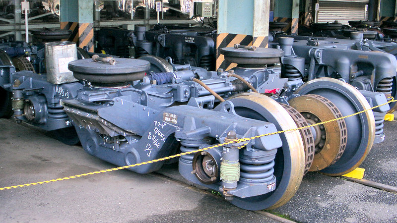 JR九州883系電車、クロハ882形TR402K台車。